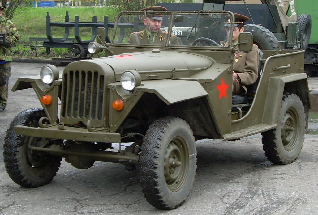 Gaz-67, russian military car, Piotr Widuchowski